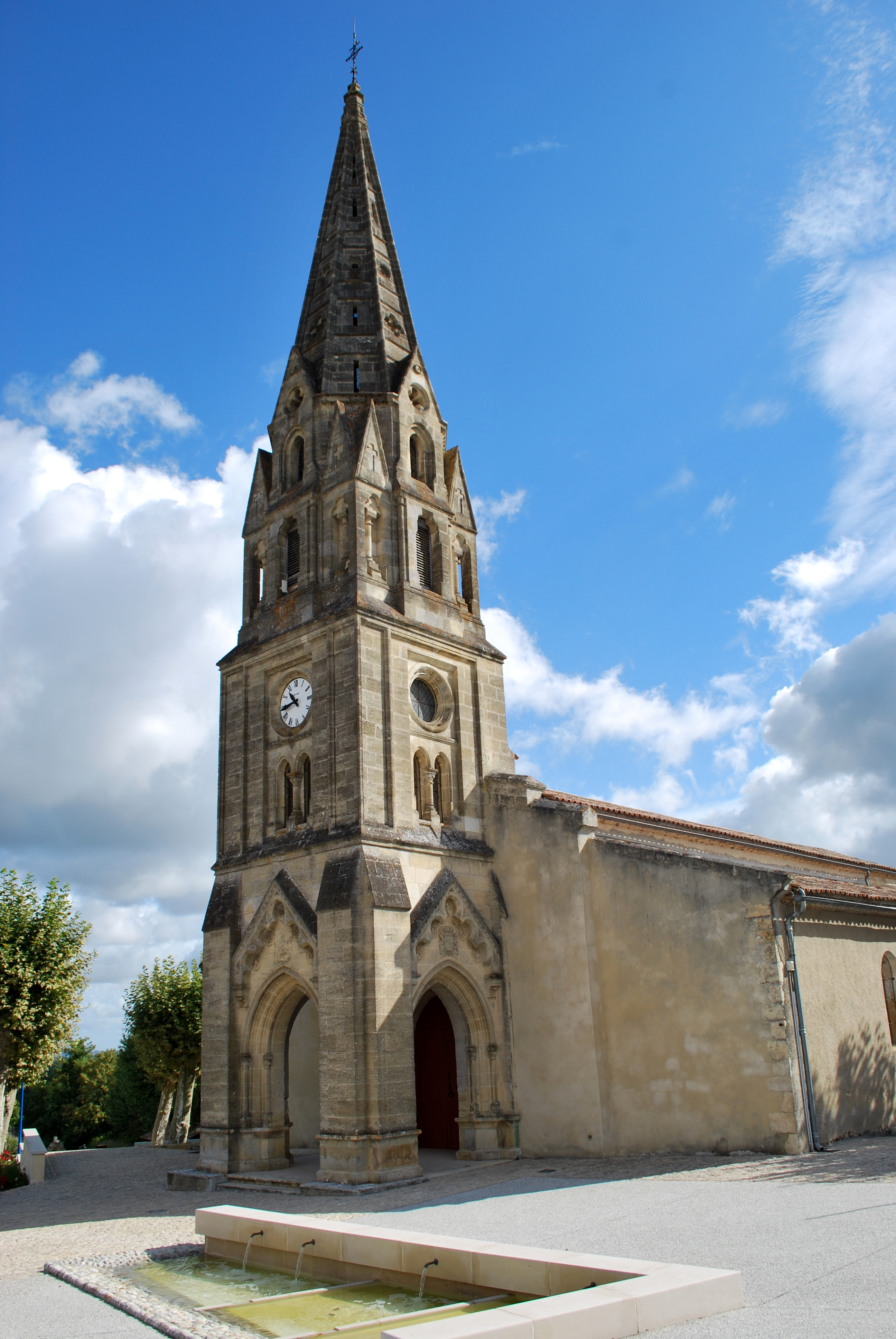 Église Saint-Romain de Budos